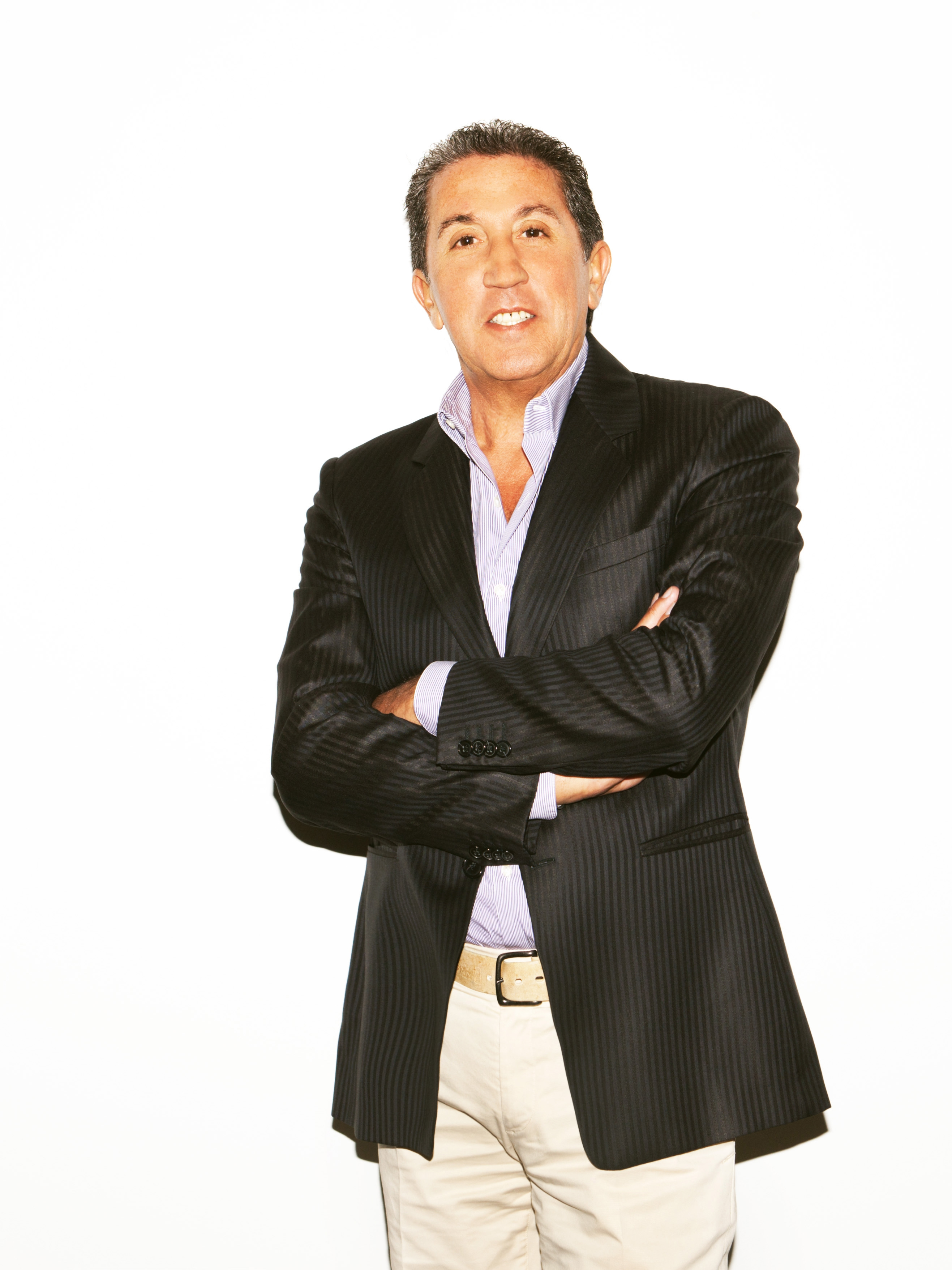 Lorenzo Suraci - Editore RTL 102.5